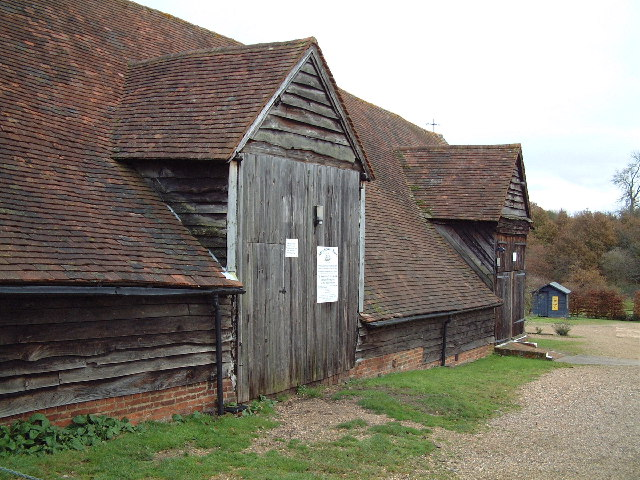 Mayflower Barn